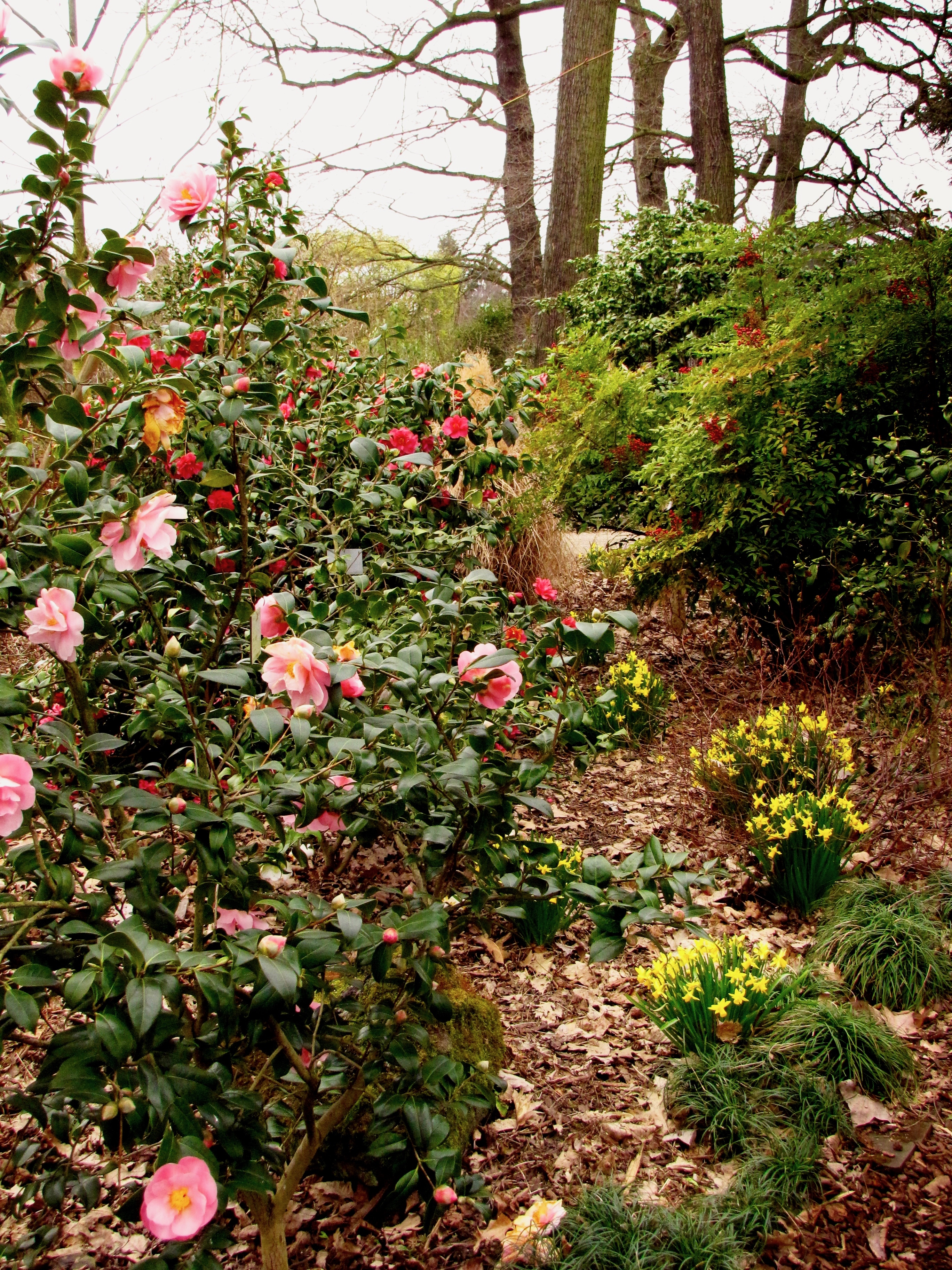 Flora (Köln): Der 2000 angelegte Kamelienwald zeigt rund 250 Kamelien im Freiland. Die winterharten Sorten blühen zwischen Januar und April. Aufnahme im April.